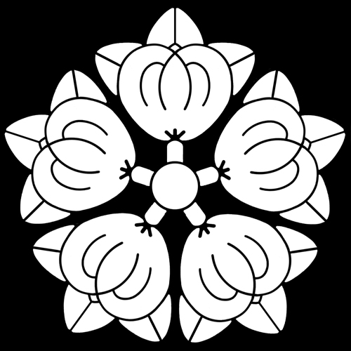 「五つ橘」紋（染抜）